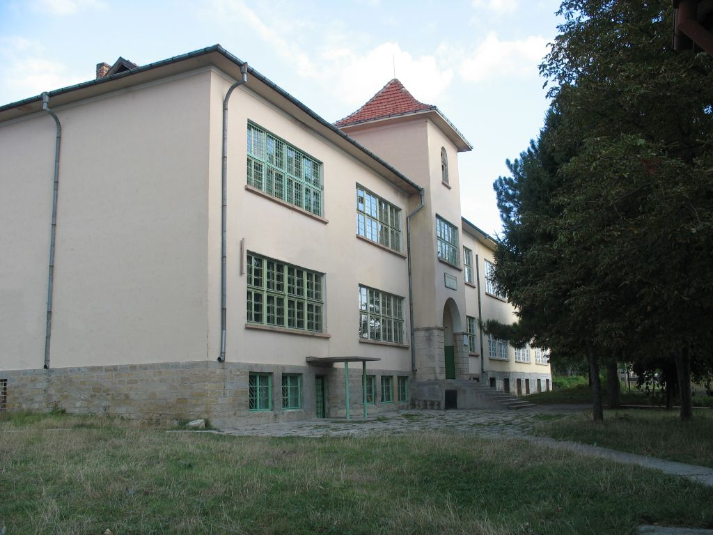 Училището в Светлен, Област Търговище